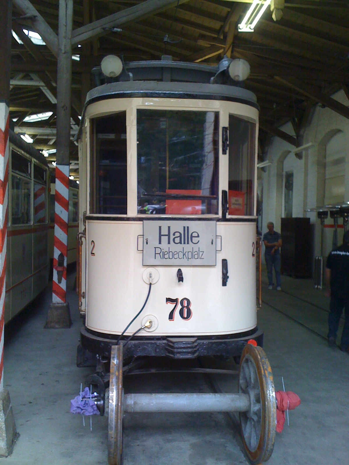 Wagen 78 des Straßenbahnmuseums Halle (Saale), Bj.1912, Gottfried Lindner AG